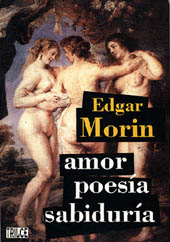 Tapa de libro publicado por Ediciones Trilce (Montevideo, Uruguay)